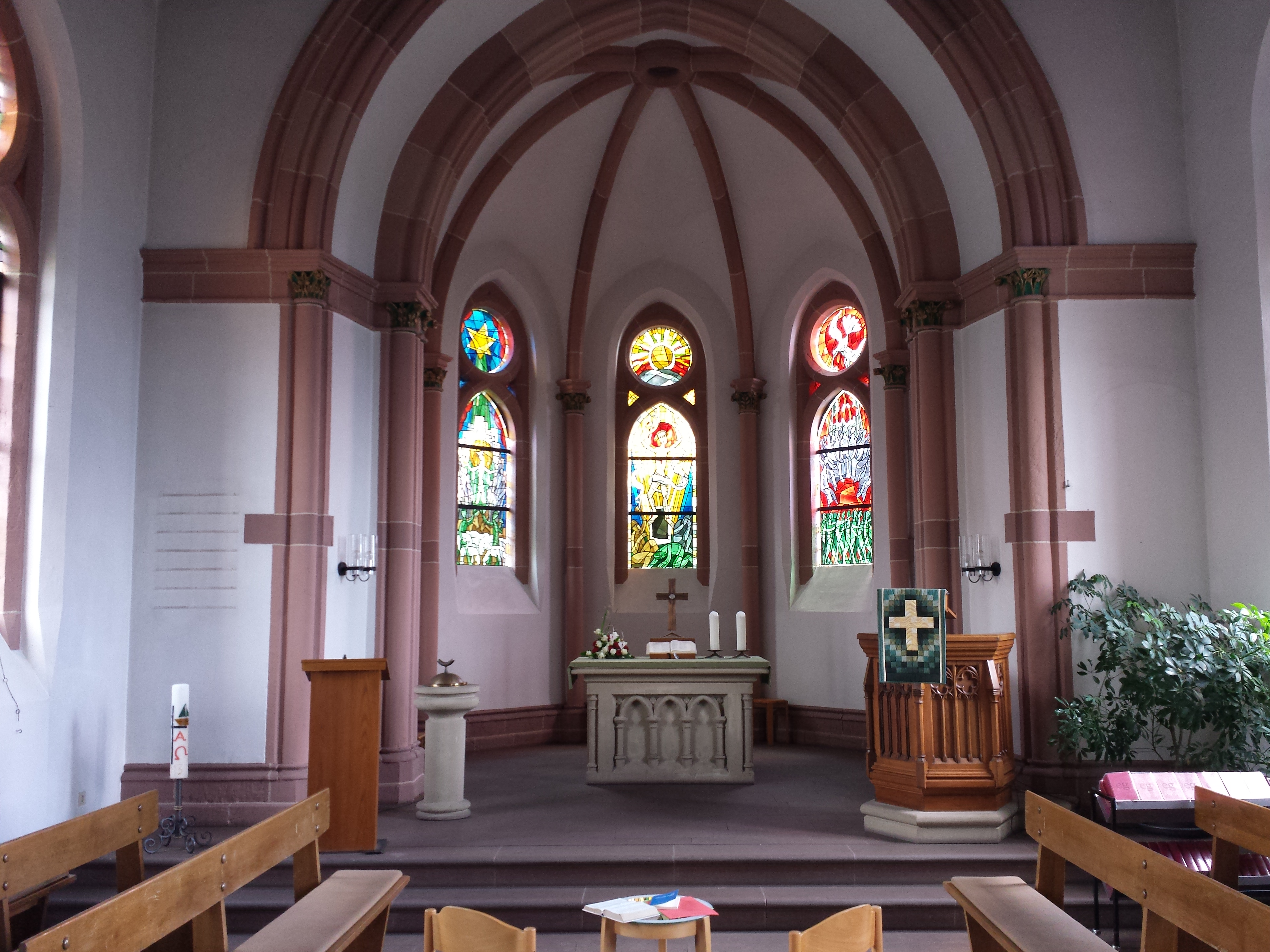 Saarburg trip 2013